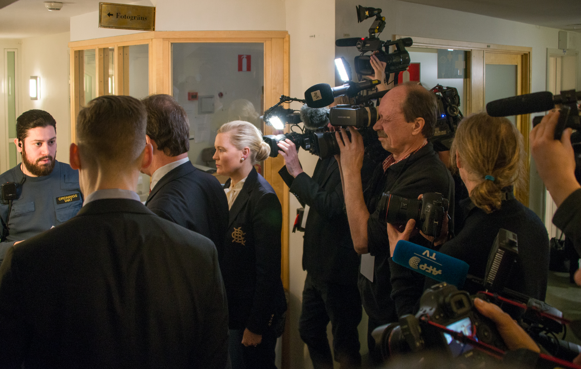 Rättegången mot den terrormisstänkte Rakhmat Akilov inleds den 13 februari 2018. (Målsägandebiträde advokat Jessica Sandberg i mitten).